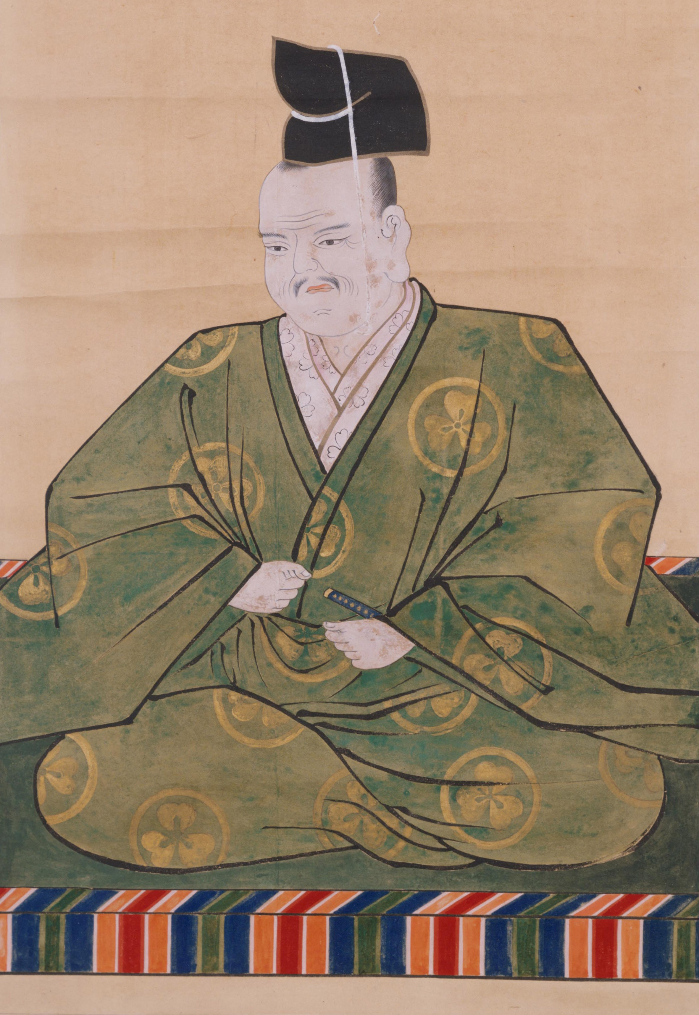 酒井重忠の肖像(部分)。